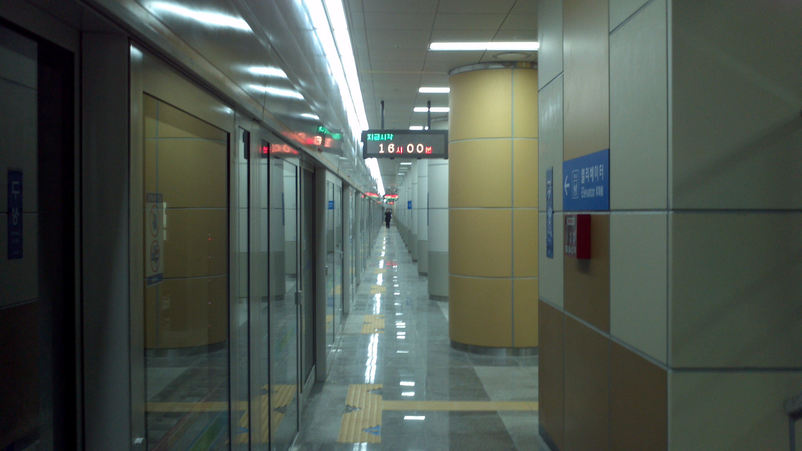 구성역 2번 승강장